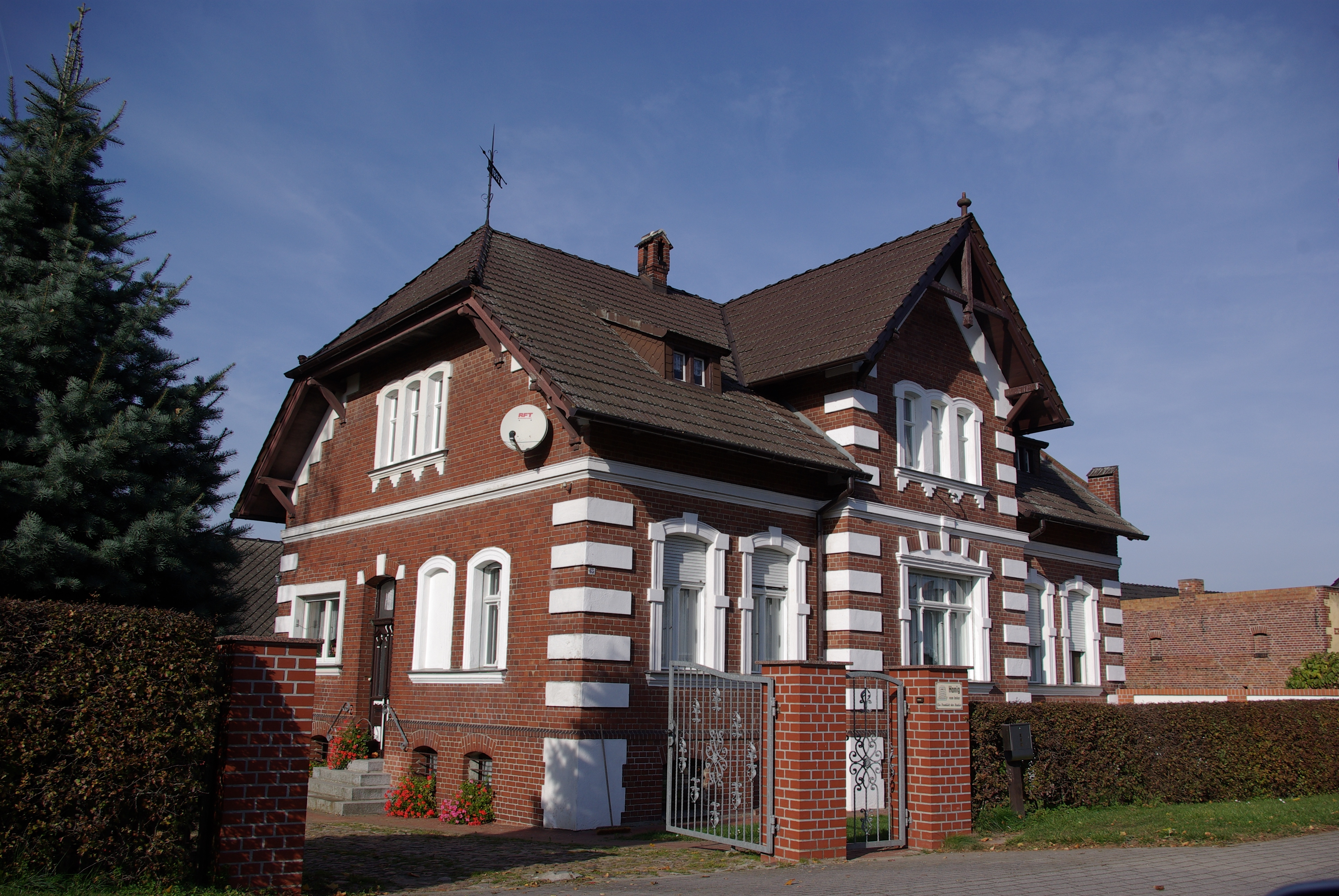 Niedergörsdof Ortsteil Malterhausen in Brandenburg. Das Haus Malterhausen 65 wurde 1902 erbaut. Es steht unter Denkmalschutz.